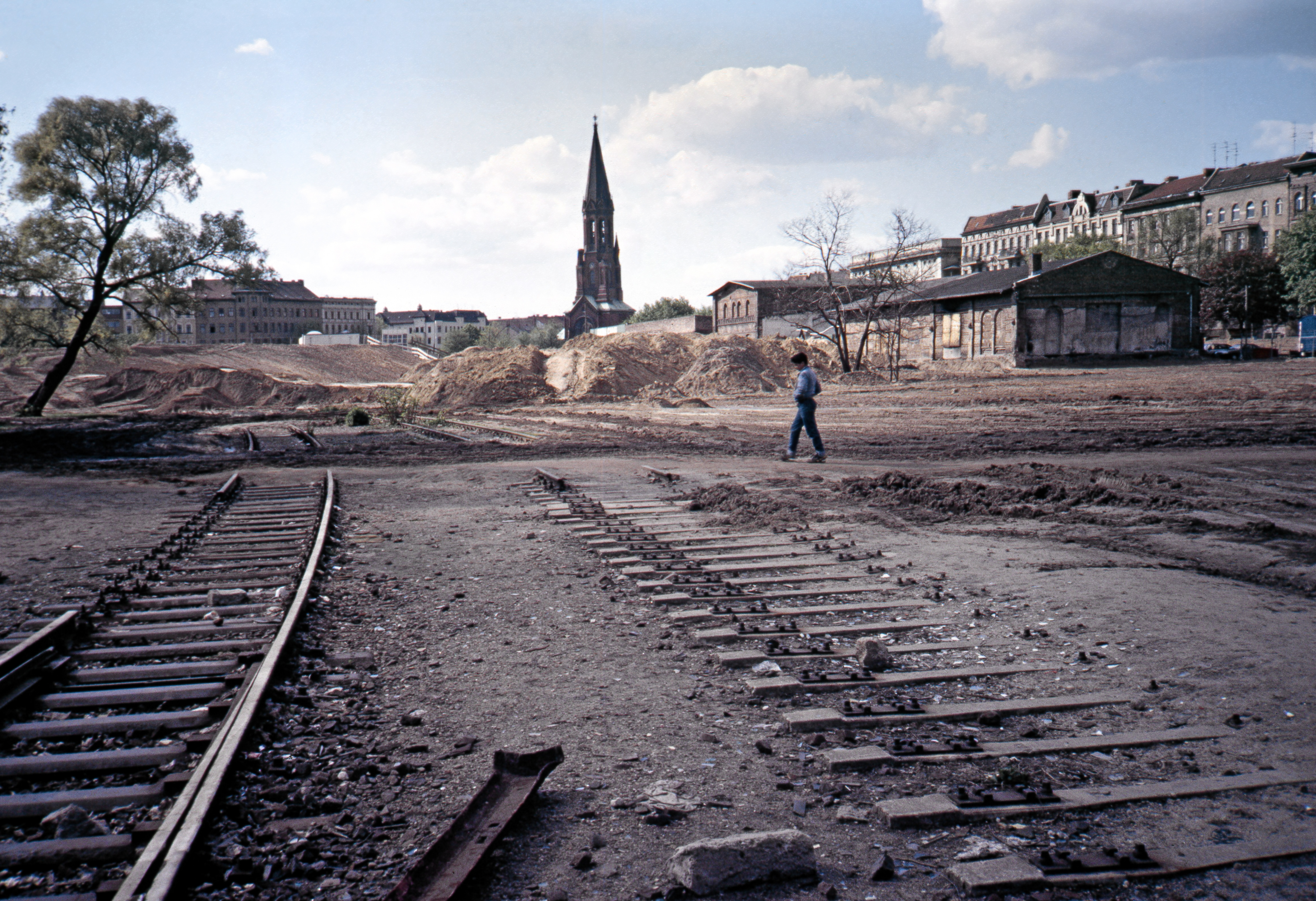 Berlin Görlitzer Bahnhof 7.5.1987, Scan von Dia